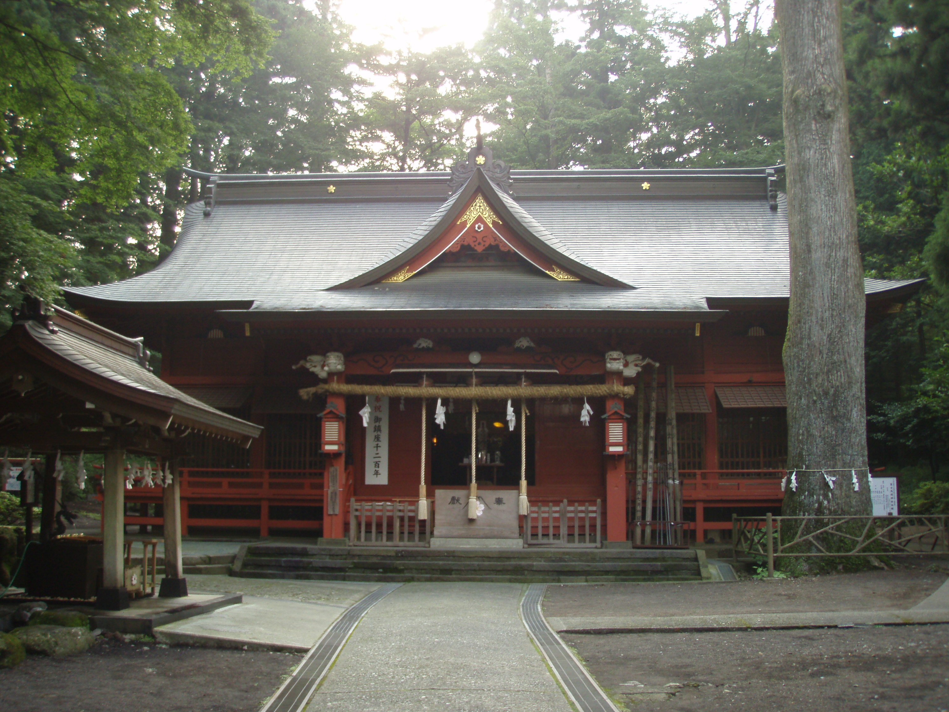 Higashiguchihonnguu-Fuji-senngenn-jinjya.Oyama cyo SHIZUOKA pref.JAPAN.